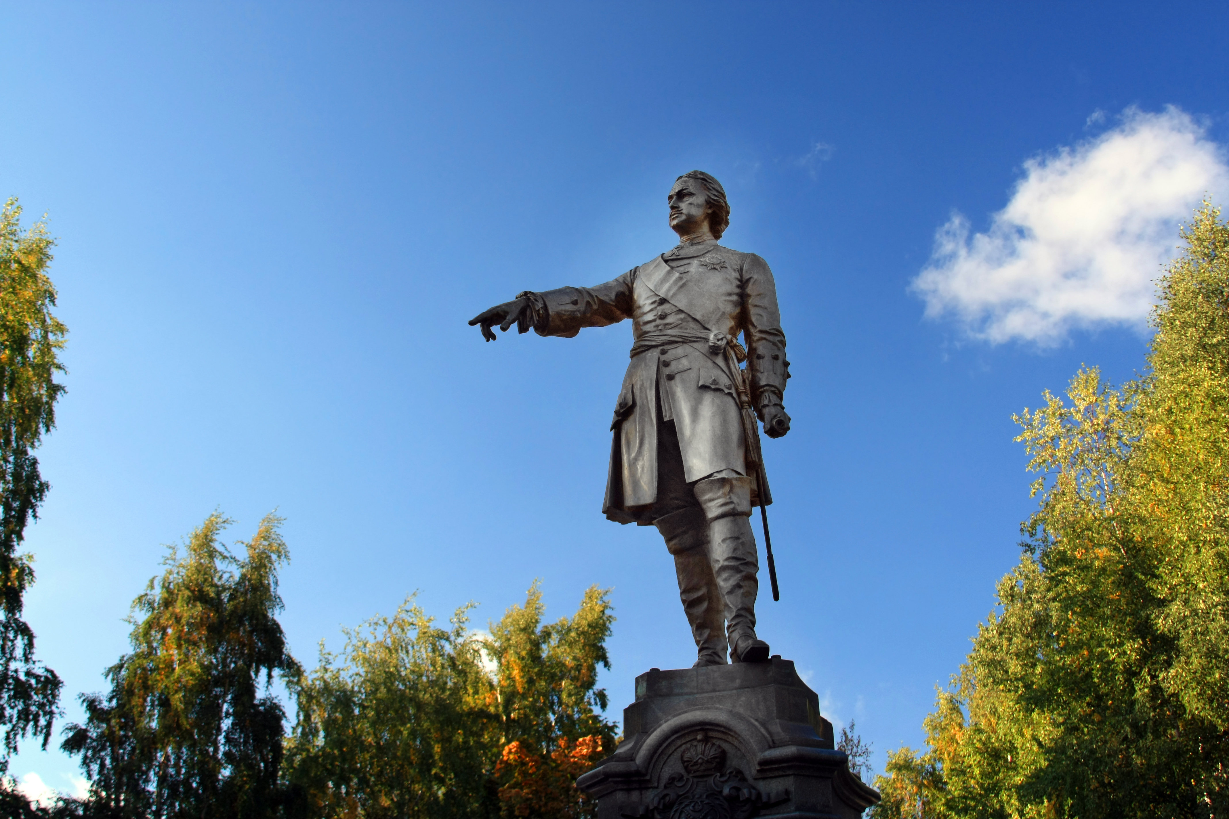 Ausammas Peeter Suur Petrozavodskis